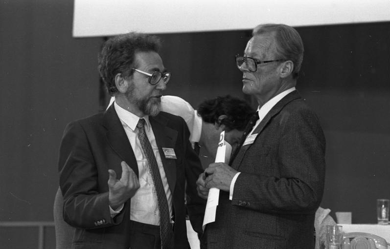 SPD-Parteitag in der Olympiahalle in München